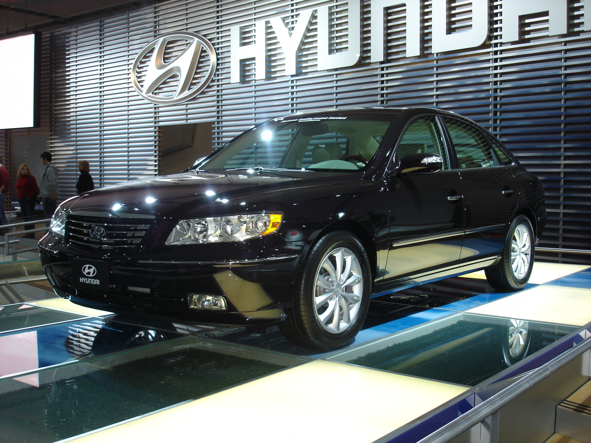 2007 Hyundai Azera